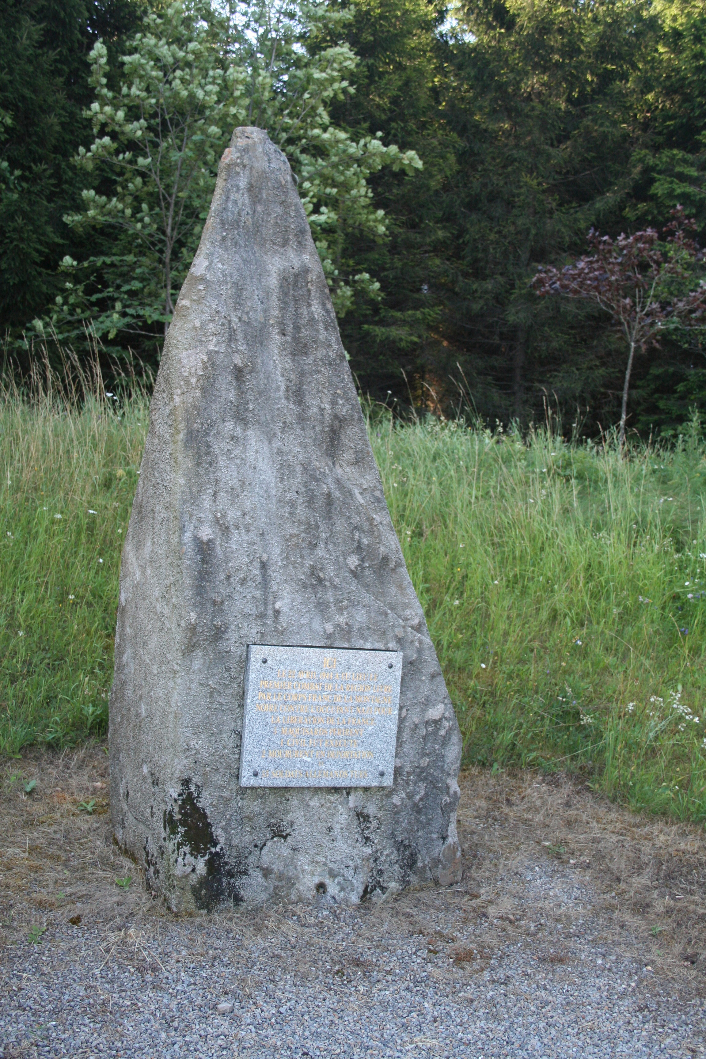 Lacaune (Tarn) - mémorial de la Résistance (route D607)